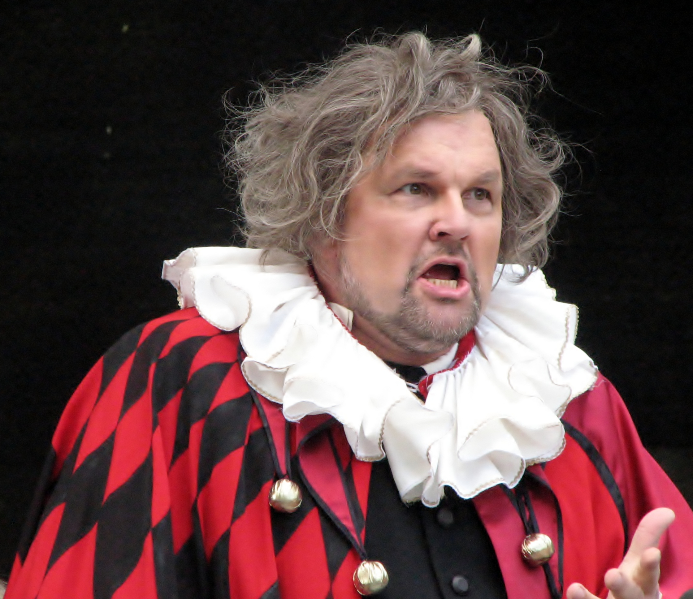 Jassi Zahharov esinemas Rahvusooper Estonia 107. hooaja avamisel